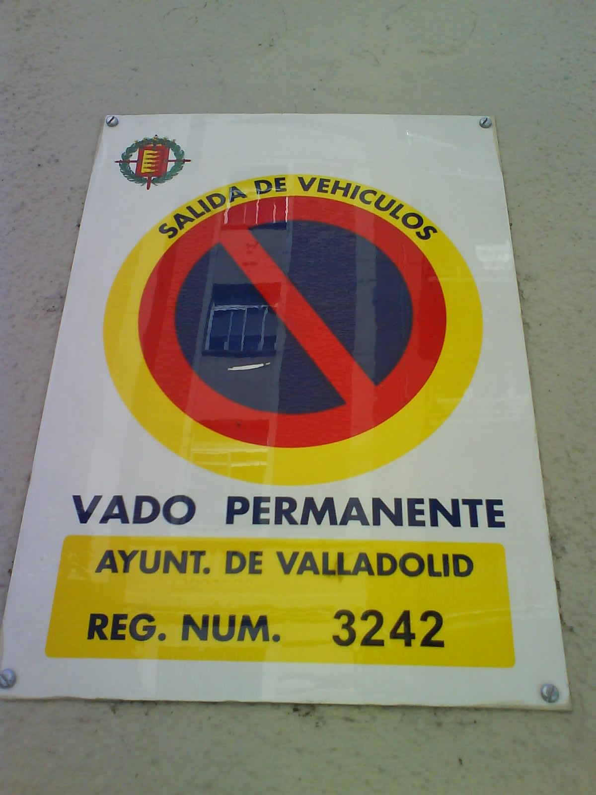 Placa de vado municipal de acceso a inmuebles del Ayuntamiento de Valladolid.